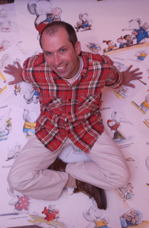 Portrait von Thomas Röhner